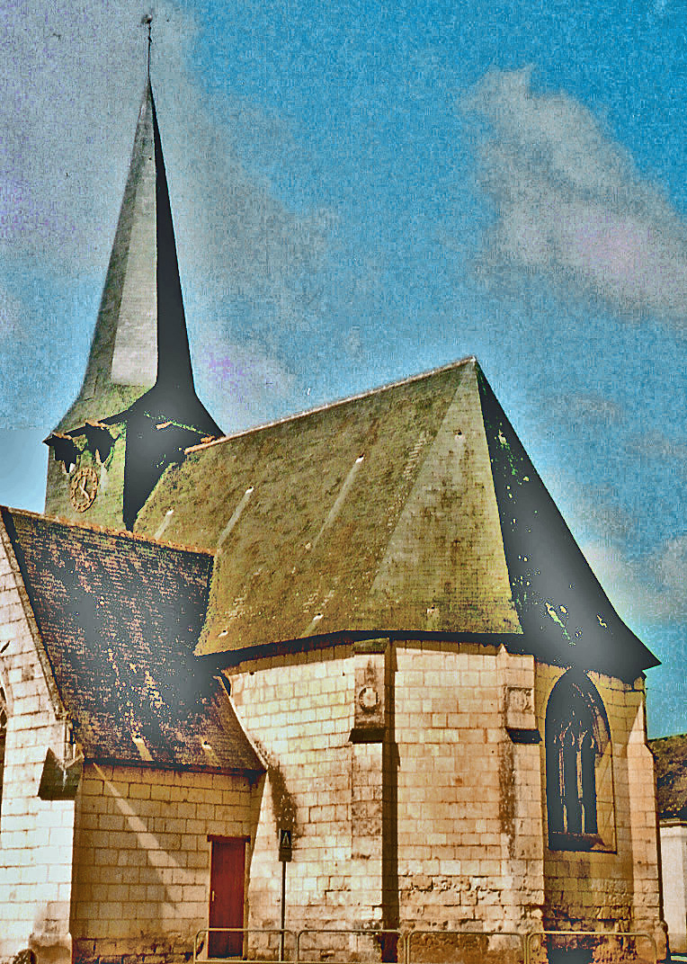 12è 16è siècle .